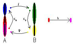 Ilustrace k důkazu Cantor-Bernsteinovy věty. Autor:Petr Glivický